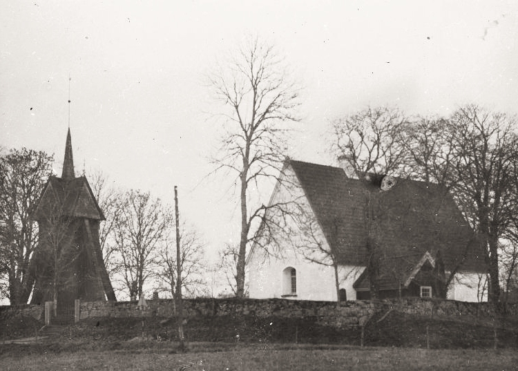 Vittaryds kyrka